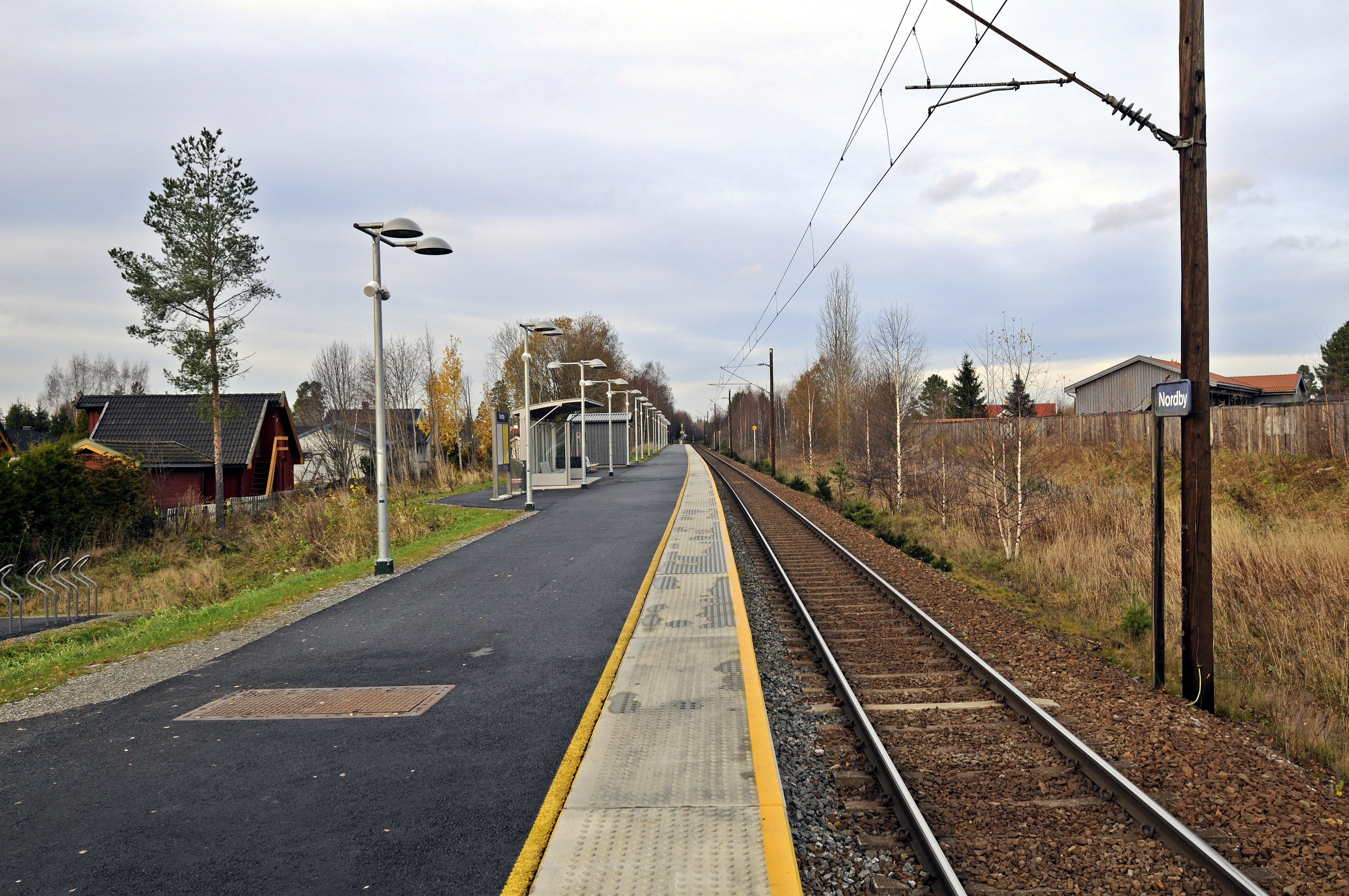 Nordby stasjon på hovedbanen på Jessheim